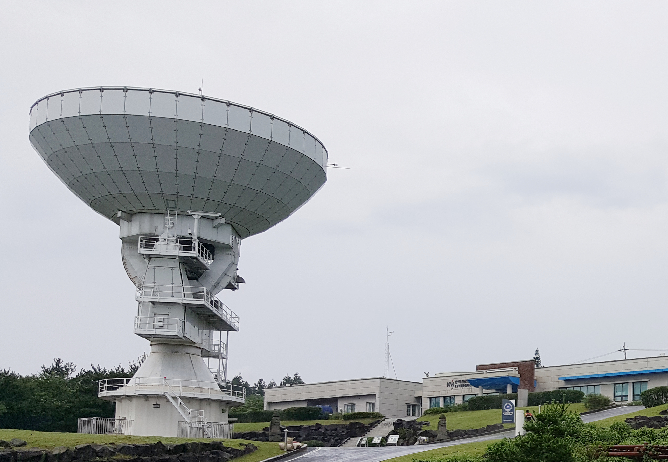 South Korea, Jeju island, Tanma Radio Observatory, part of KVN cutting 20170801 original 20170718